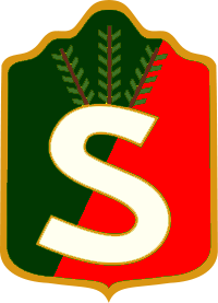 Pohjolan suojeluskuntapiirin käsivarsikilpi.